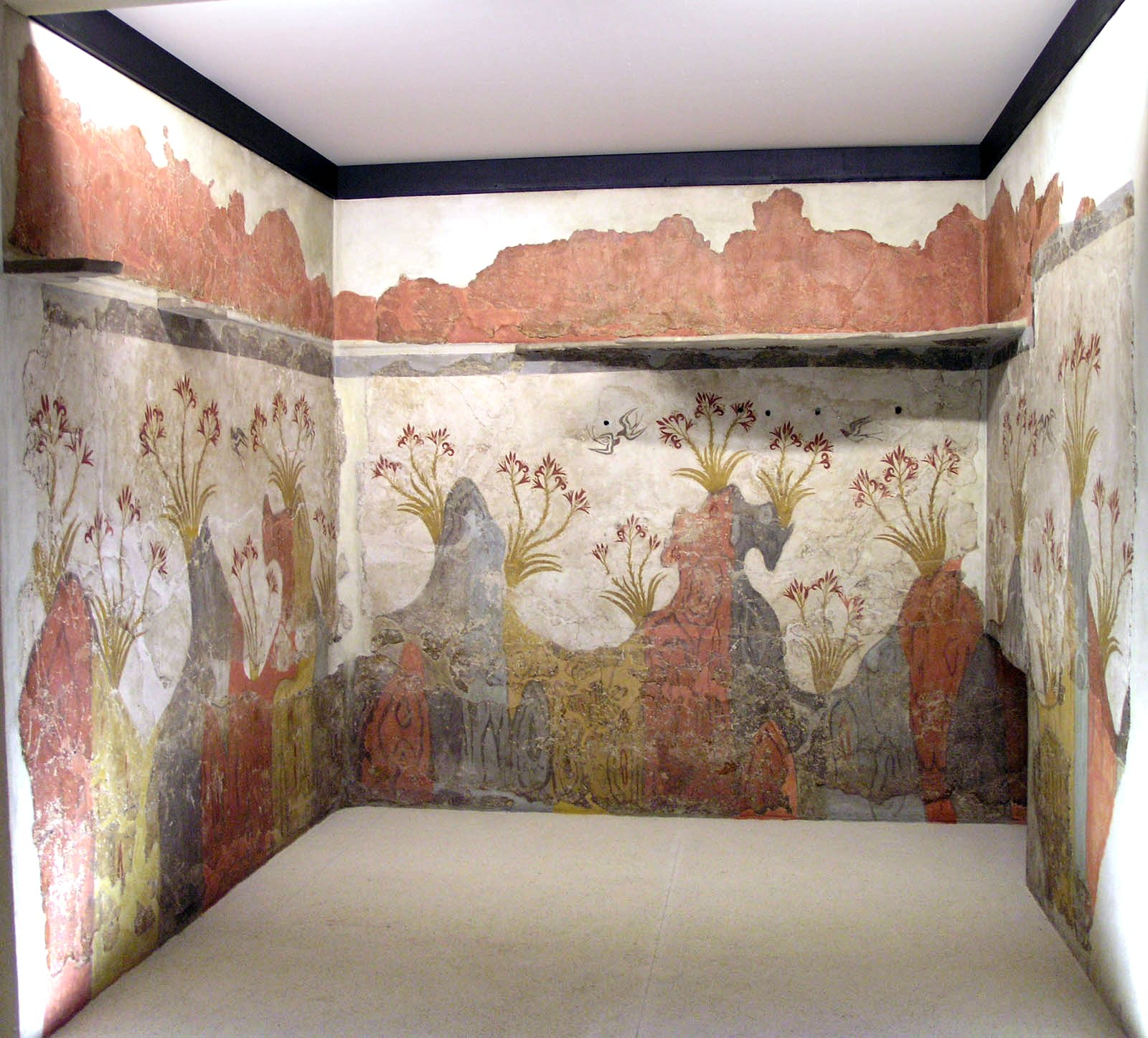 Fresque du Printemps. C'est la seule fresque d'Akrotiri à avoir été trouvée in situ, couvrant trois murs de la même pièce. Elle dépeint un paysage rocheux de l'île, avant l'éruption volcanique : de petits groupes de lis rouges dominent les formations volcaniques rouges et grises, tandis que des hirondelles survolent la scène et annoncent symboliquement la renaissance annuelle de la nature. L'utilisation très riche des couleurs (blanc, rouge, jaune et bleu) et le mouvement créé par le balancement des fleurs dans le vent et le jeu des hirondelles permettent d'attribuer cette fresque au peintre des « Cueilleurs de Crocus ». La pièce avait une étagère, en hauteur sur un mur, et une ouverture menant à une pièce plus petite au nord. Le modèle en plâtre d'un lit provient aussi de cette pièce. Pièce D2, édifice D à Akrotiri.